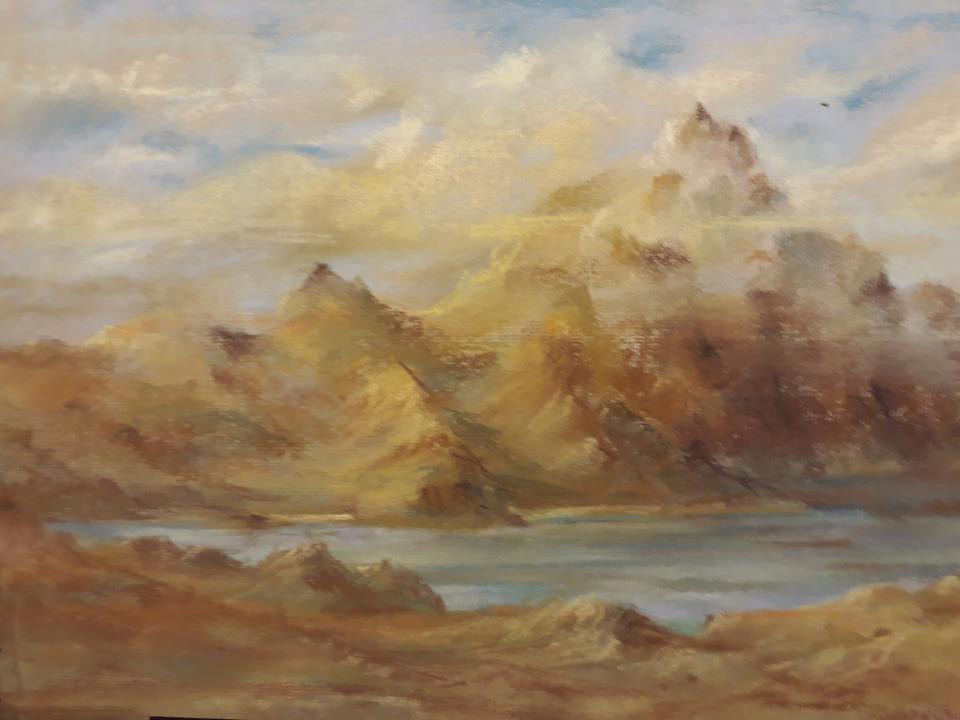 „Jezioro Konsajoa”, sucha pastela na papierze. autor: Jacek Kotela. 2001 r.